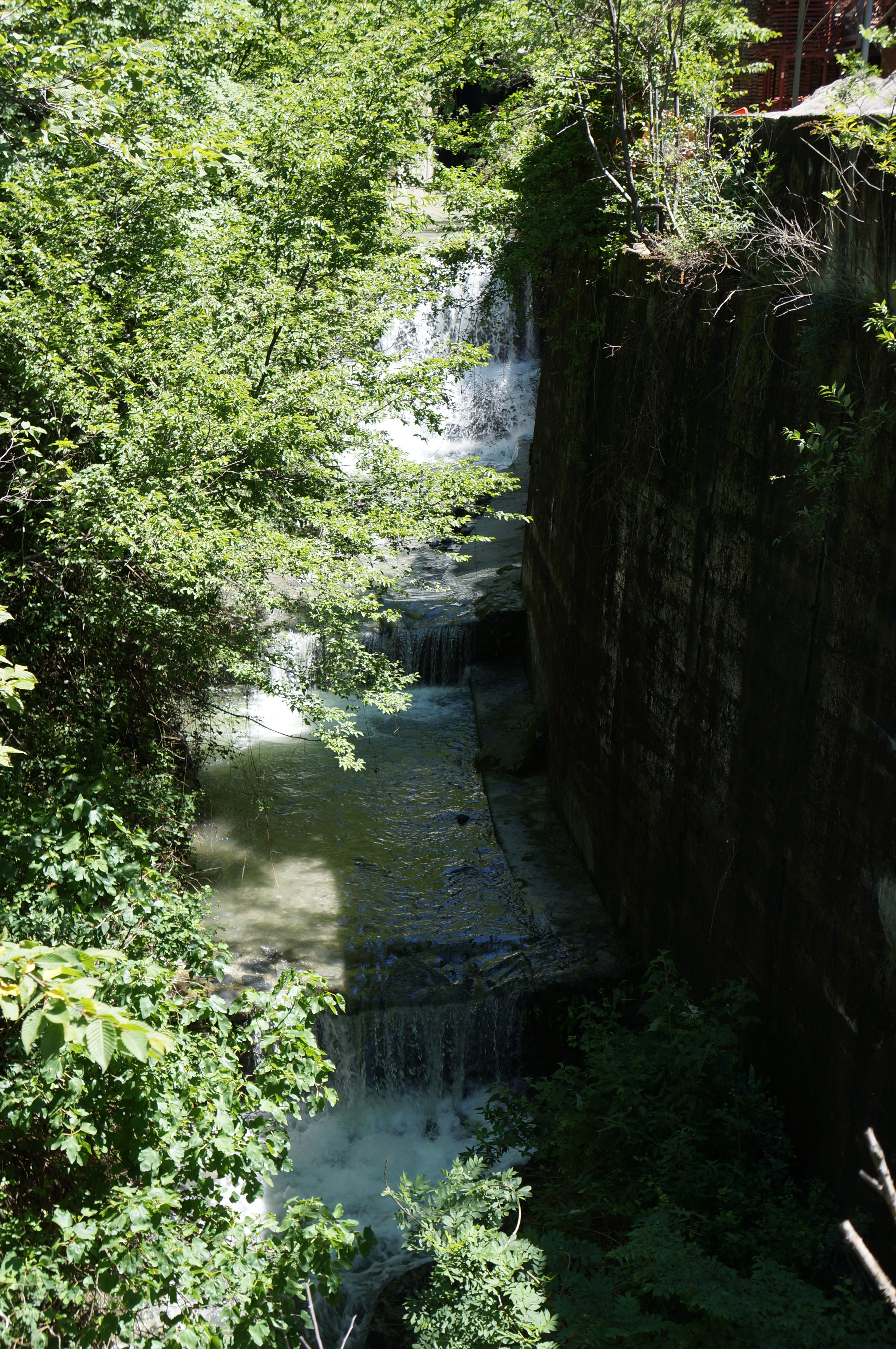 torrente Esino in un giorno successivoo ad forte pioggia (giugno 2017).